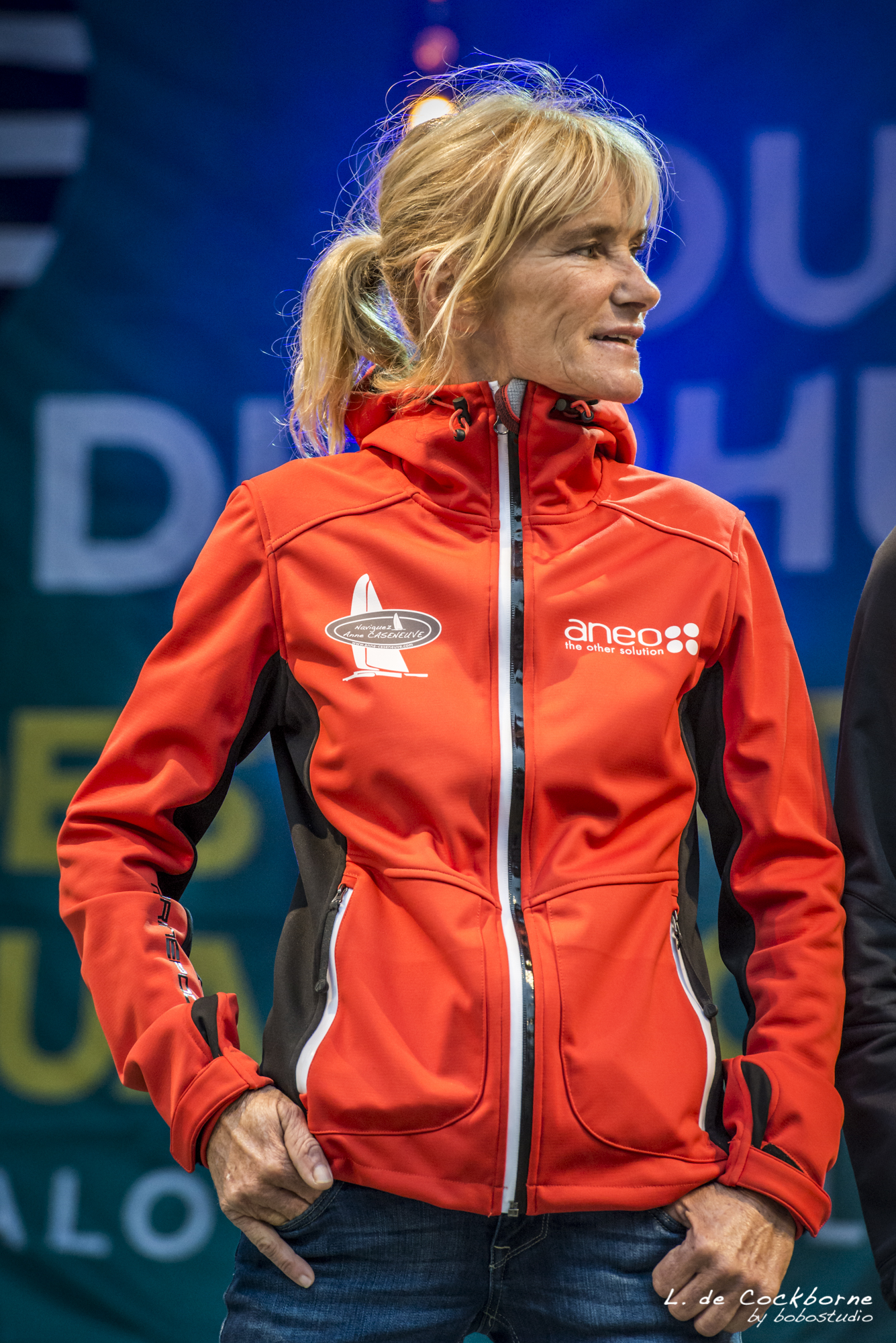 ANNE CASENEUVE